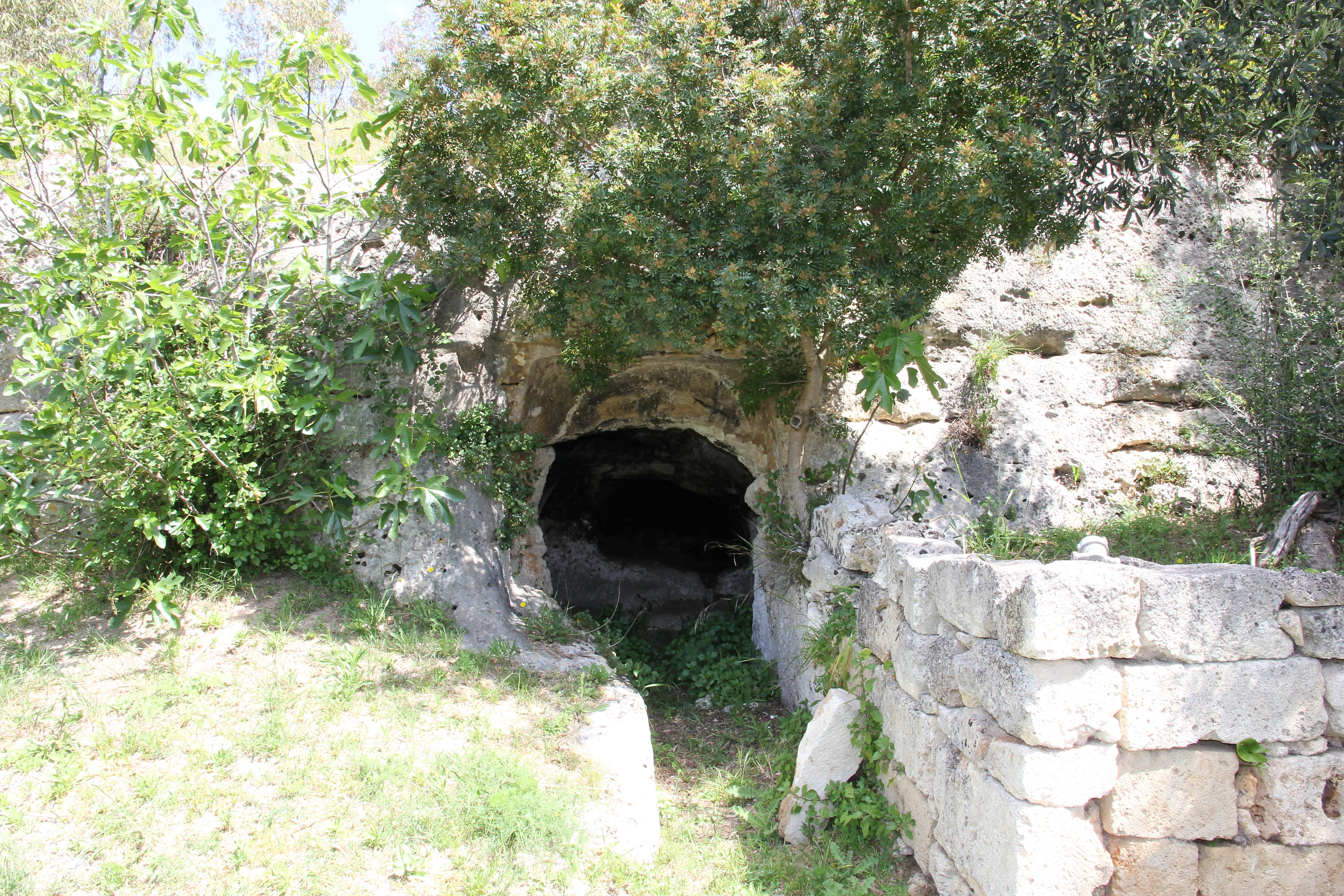 Sassari, necropoli di Li Curuneddi